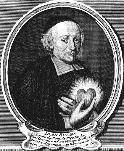 Portrait de Jean Eudes